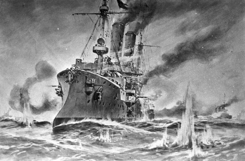 Kleiner Kreuzer "SMS Ariadne" im Gefecht Kleiner Kreuzer "S.M.S. Ariadne" der Gazellen-Klasse im Gefecht.- Gemälde von Willy Stöwer (1864-1931)